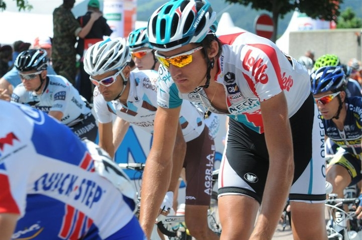 Francis De Greef (Rumst, 2 februari 1985) is een Belgische wielrenner.